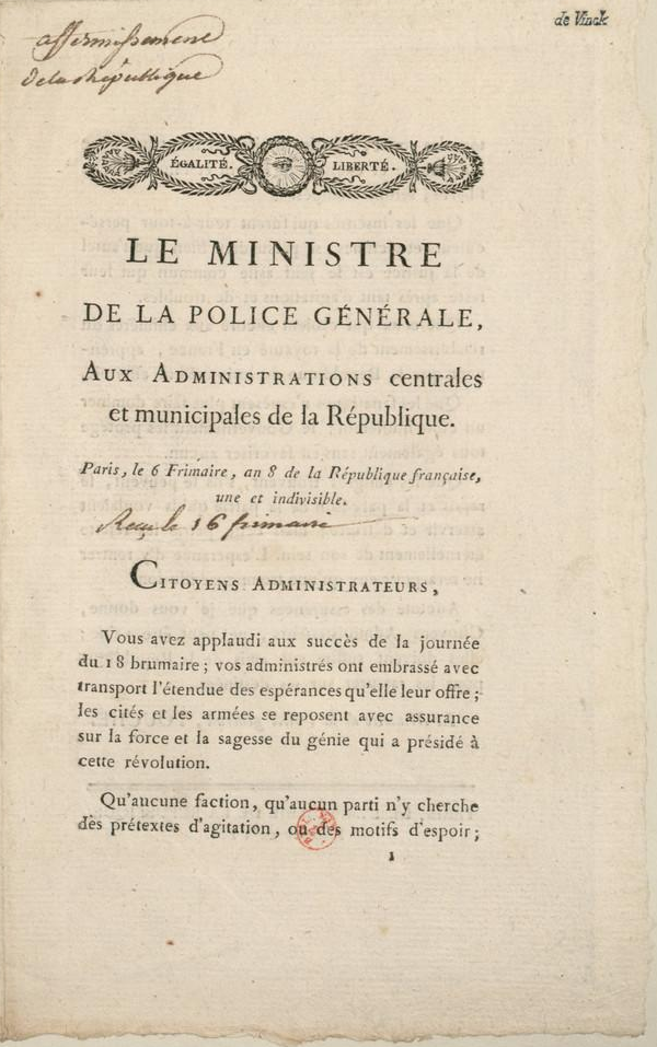 Circulaire du ministre de la Police générale Joseph Fouché, aux administrations centrales et municipales -Paris, de l'Imprimerie de la République, 6 Frimaire an VIII (1799)